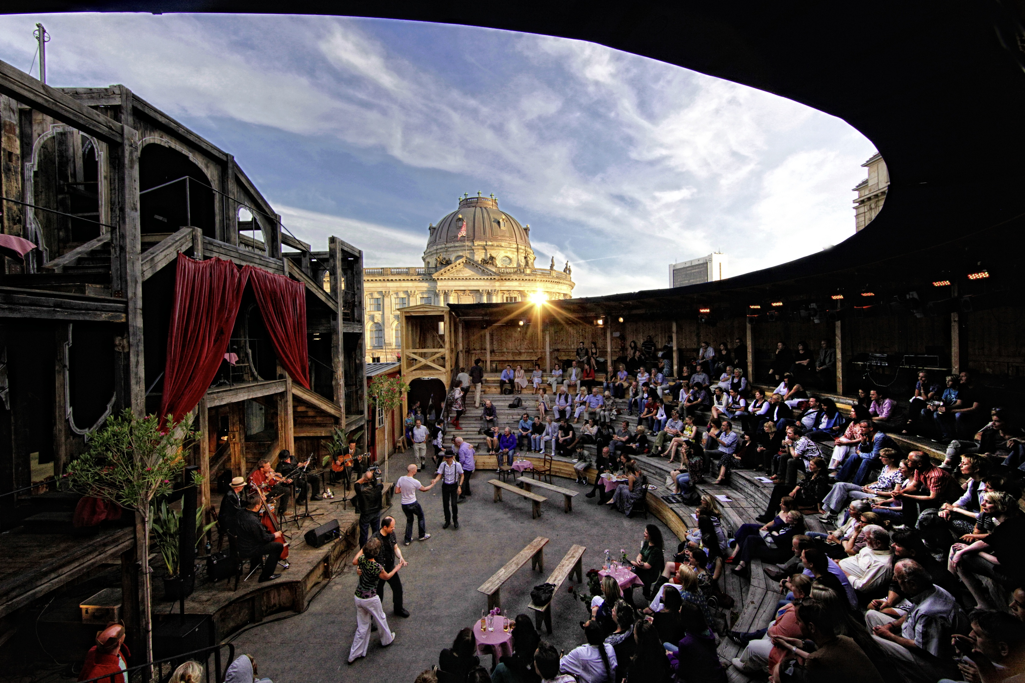 Amphitheater des Monbijou Theater gegenüber Bode-Museum Berlin. Es ist ein Sommertheater.© bernd schönberger